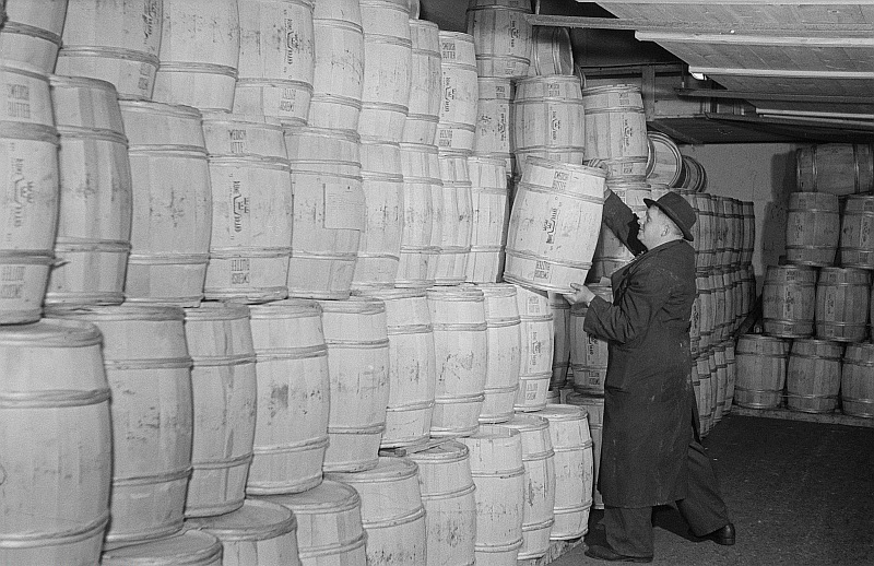 Original image description from the Deutsche Fotothek Kurt Krause beim Stabeln von 50 Kilo Butterfässern des VEB Kühlhaus und Eiswerke